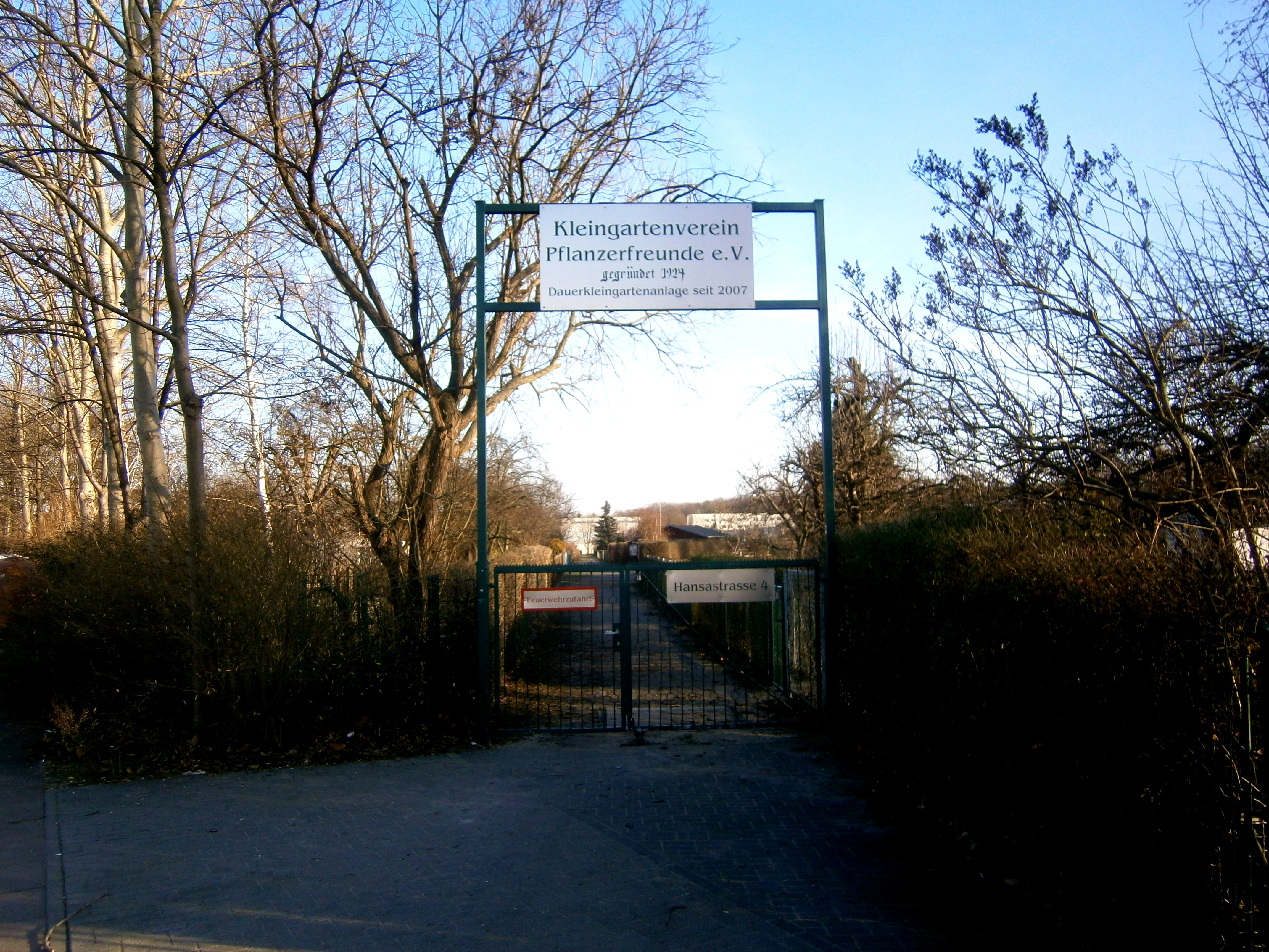 Die Hansastraße ist eine Berliner Straße mit übergeordneter Bedeutung in den Ortsteilen Alt-Hohenschönhausen und Weißensee. Sie liegt zwischen der Indira-Gandhi-Straße und der Großsiedlung Hohenschönhausen-Nord. Im Bild der Zugang zur Gartenkolonie KGA Pflanzerfreunde als Hansastraße 4 an der Ostseite der Straße in Alt-Hohenschönhausen gelegen. Die Ostseite der südlichen Hansastraße um den Orankeweg wird von Kleingärtenkolonien und die Westseite vom Auferstehungsfriedhof dominiert.